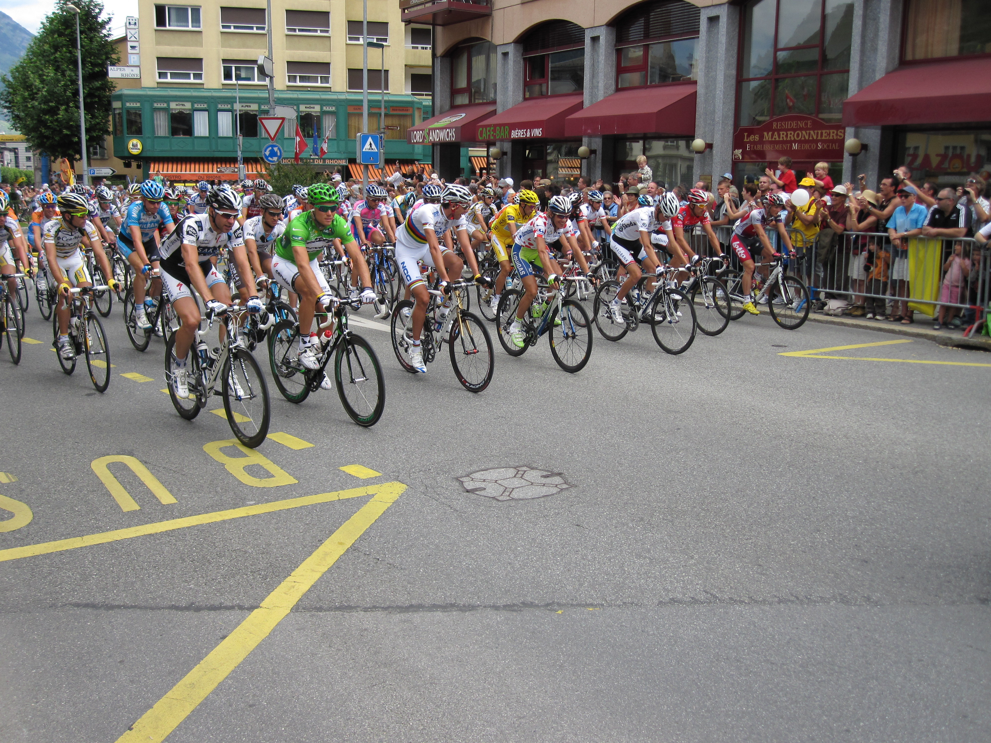 start Tour de France 2009 vanuit Martigny